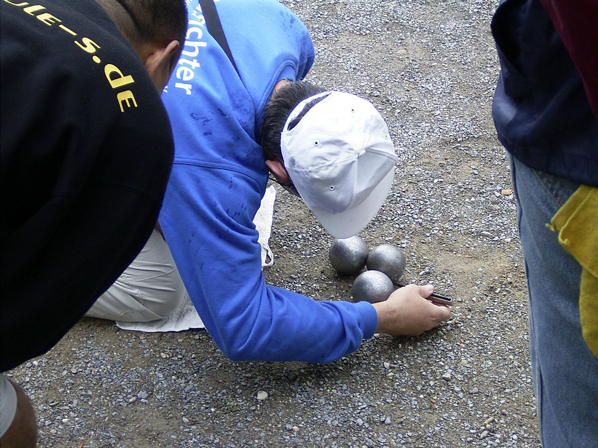 Pétanque balls